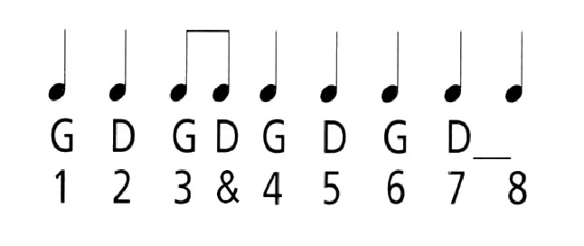 Suite d'appuis pied gauche (G) / pied droit (D) sur huit temps, avec subdivision aux temps 3 & 4, le temps 8 est suspendu pour pouvoir repartir du pied gauche au temps 1 suivant.